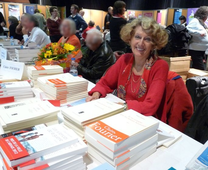 Festival du Livre de Carhaix 28/10/2012